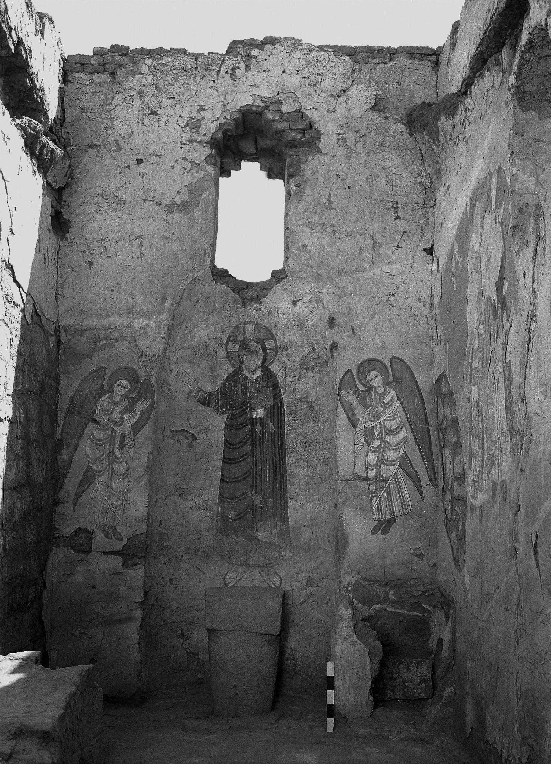 Wykopaliska w Faras